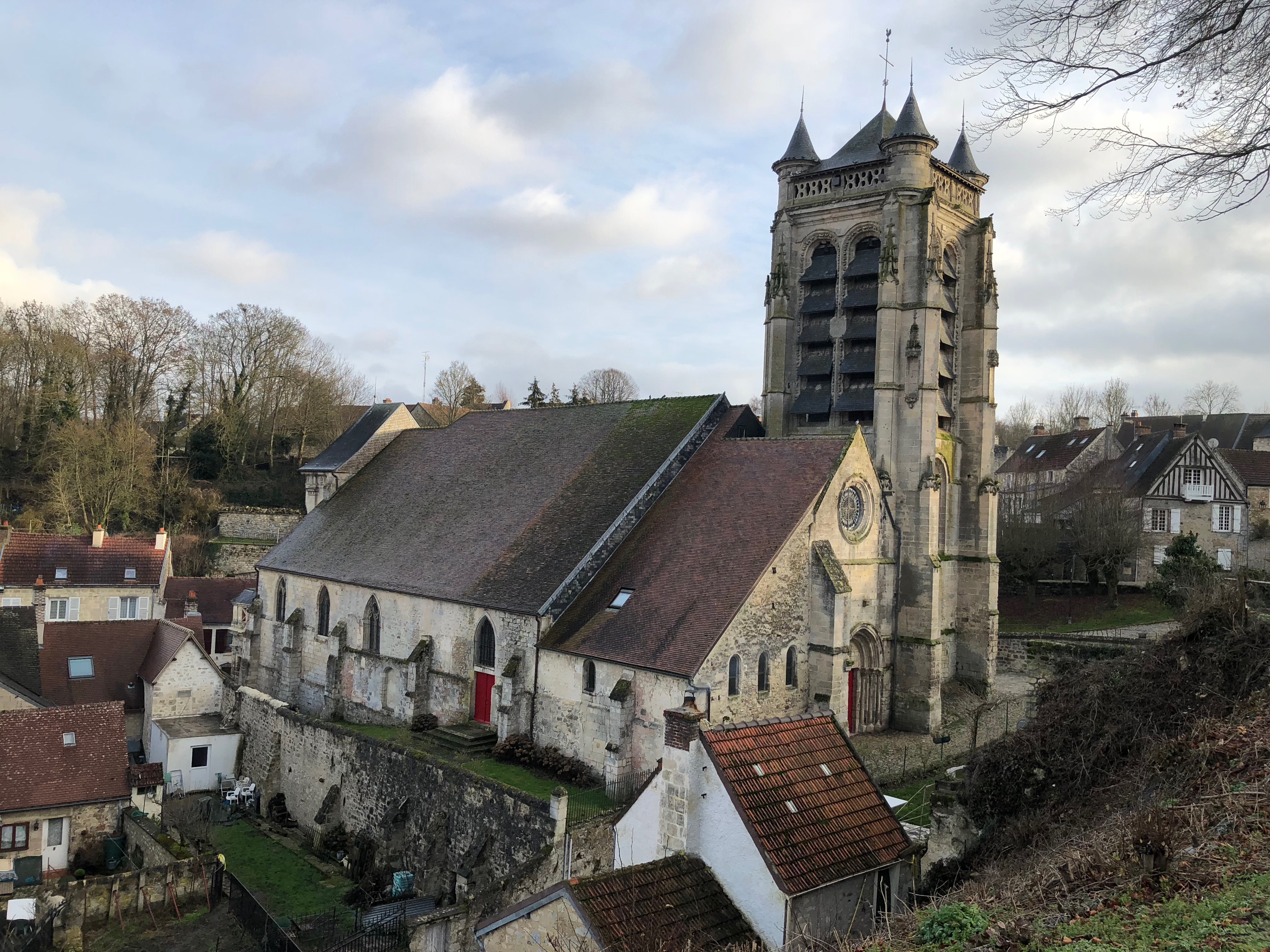 Eglise Notre-Dame. Façade nord.